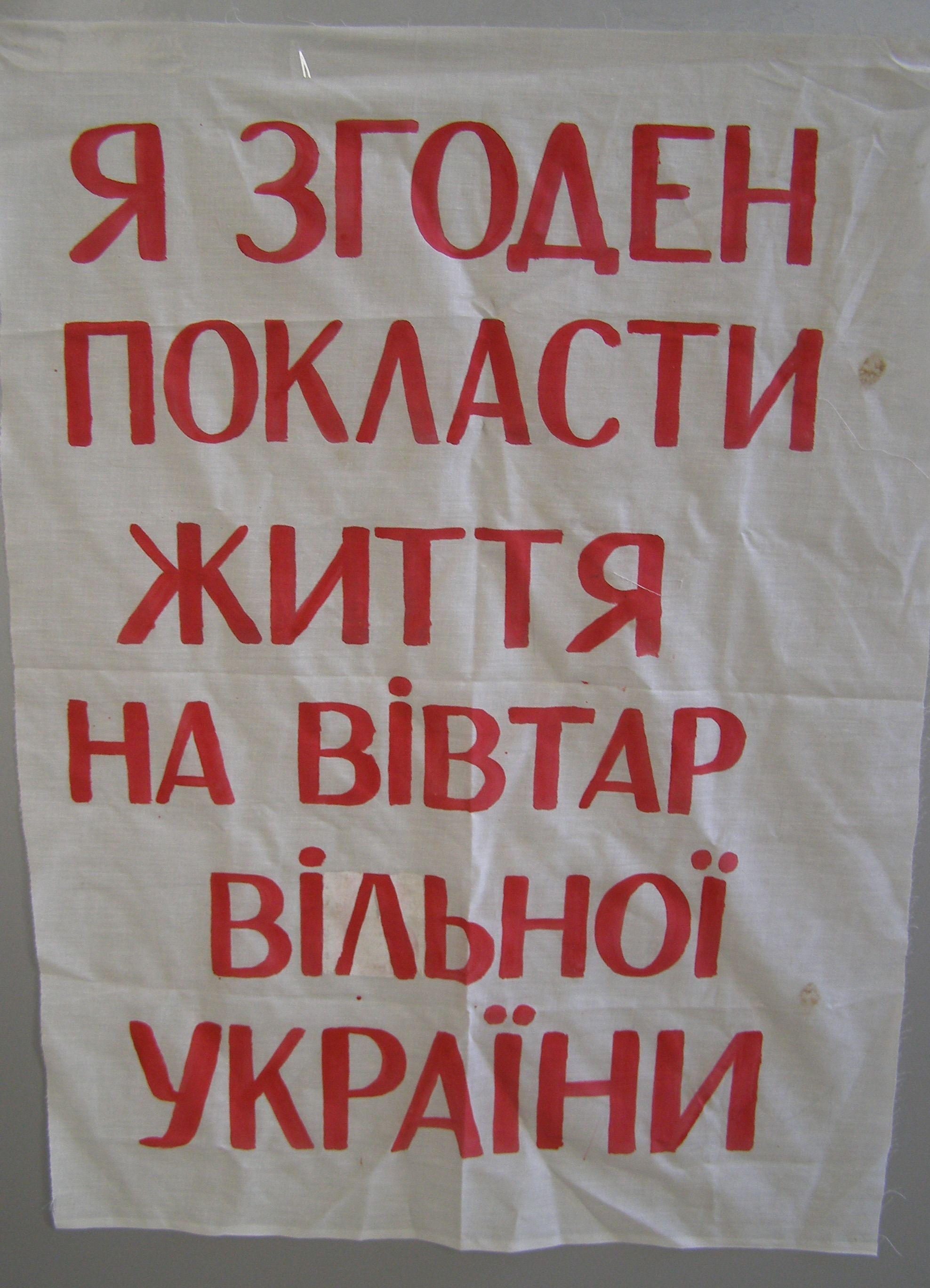 Плакат учасників студентського голодування 1990 року.